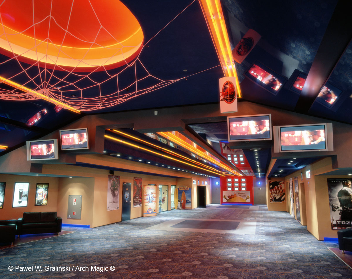 wnętrze Cinema City w CH Arkadia